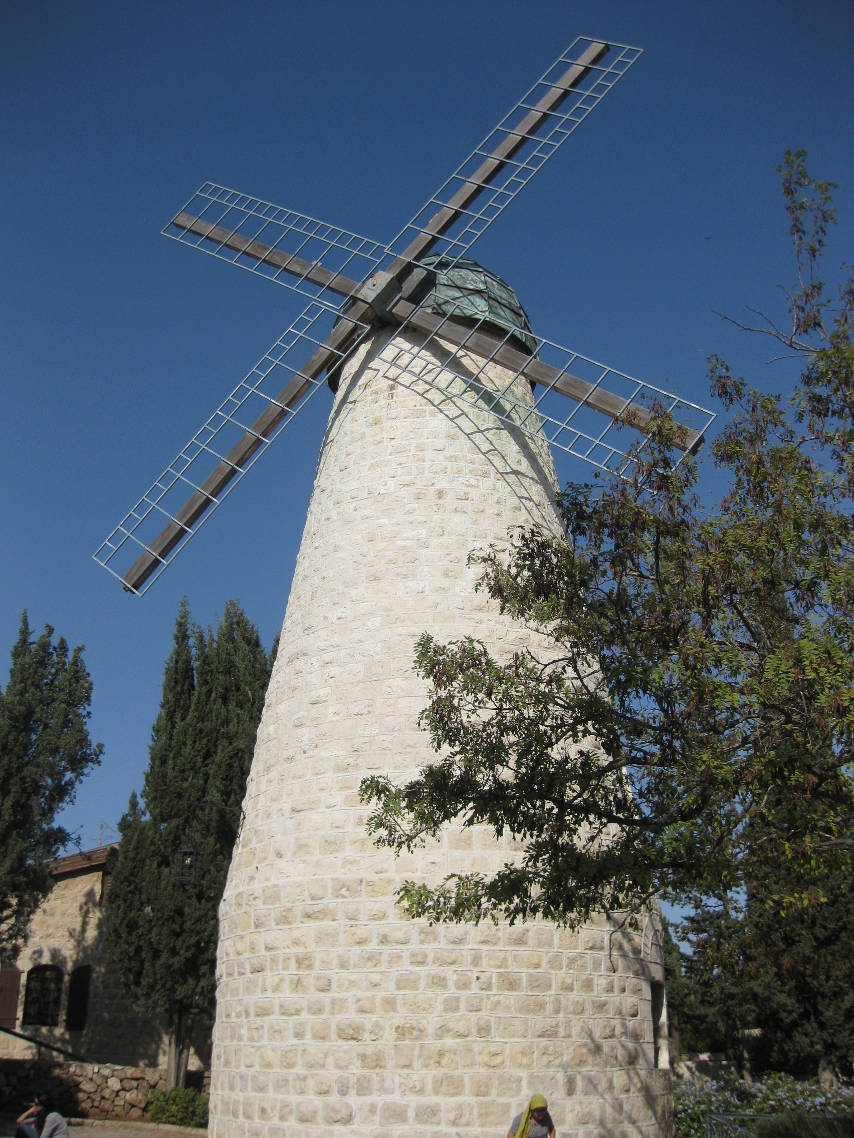 windmil in jerusalem